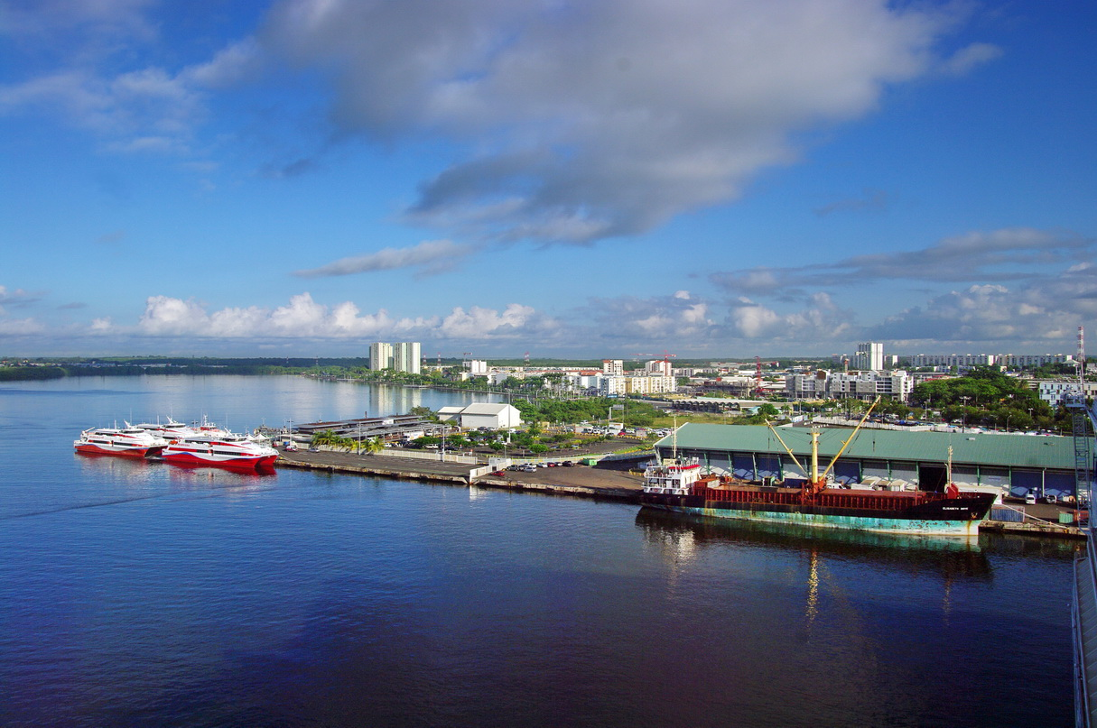 Hafen von Pointe-à-Pitre